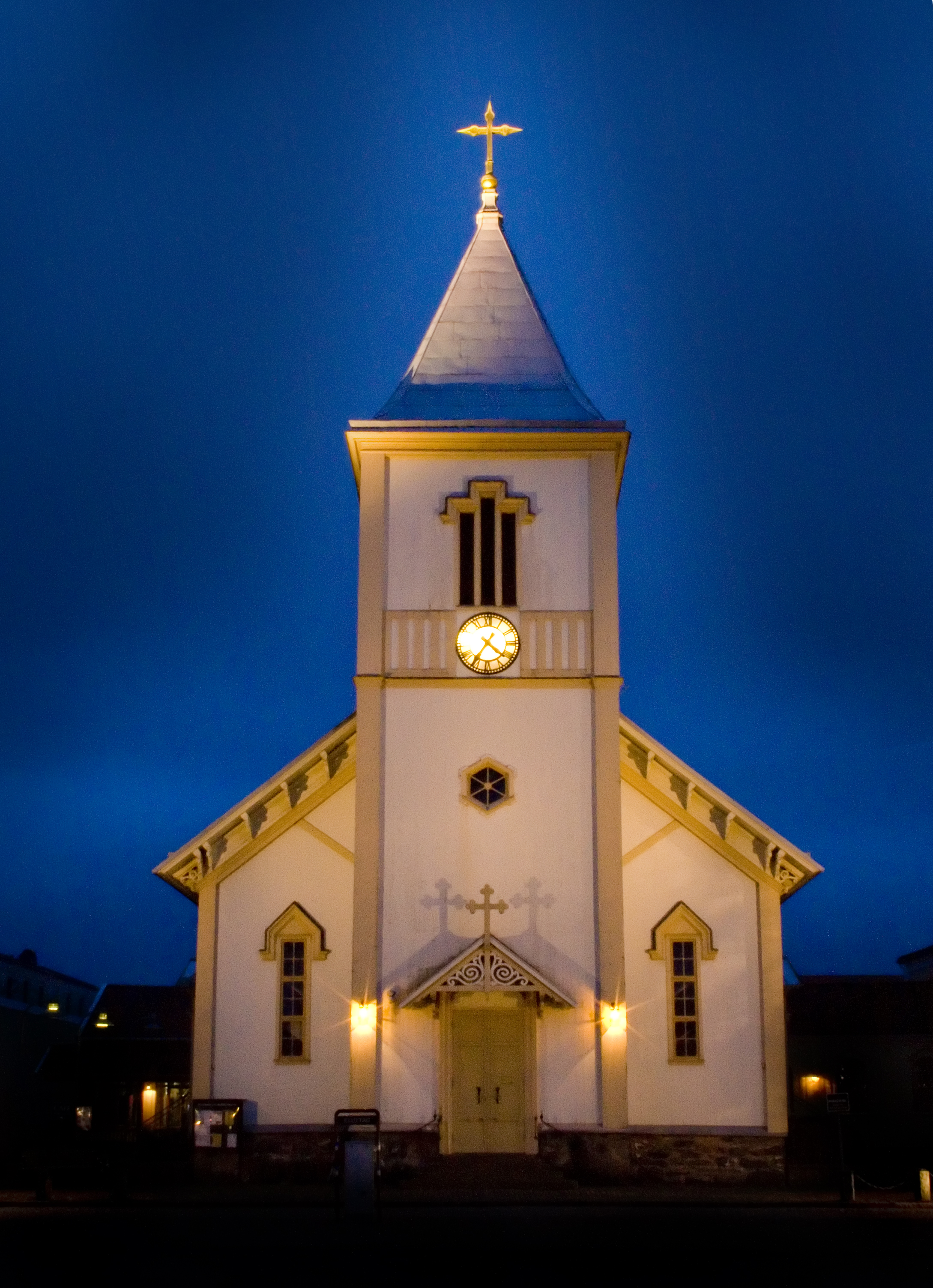 Kungsbacka kyrka